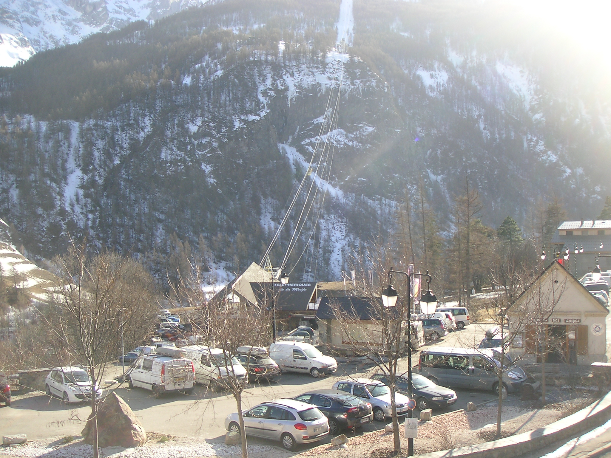 La Grave - Gare des téléphériques de la Meije - Bureau des guides